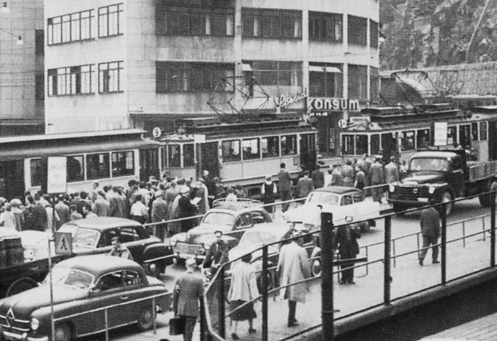 Hushörnet av KF-huset med "Special-Konsum"